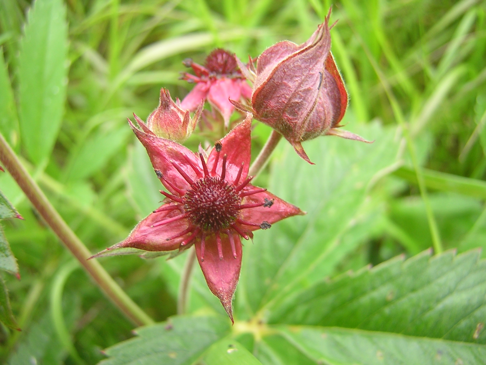 Comarum palustre, flower. Russia, Ivanovo region. САбельник болотный, цветки. Россия, Ивановская область, Южский район.